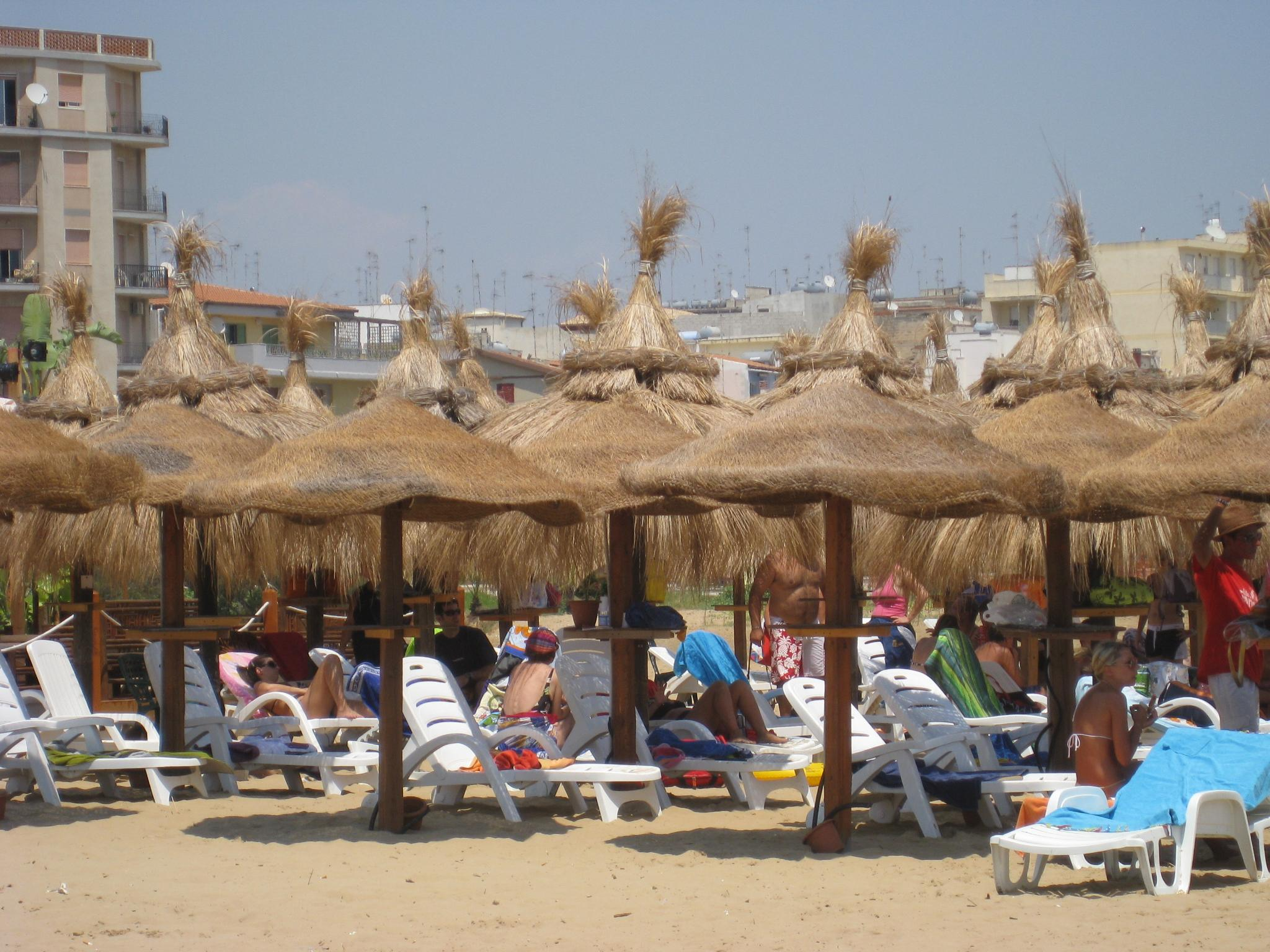 Pozzallo